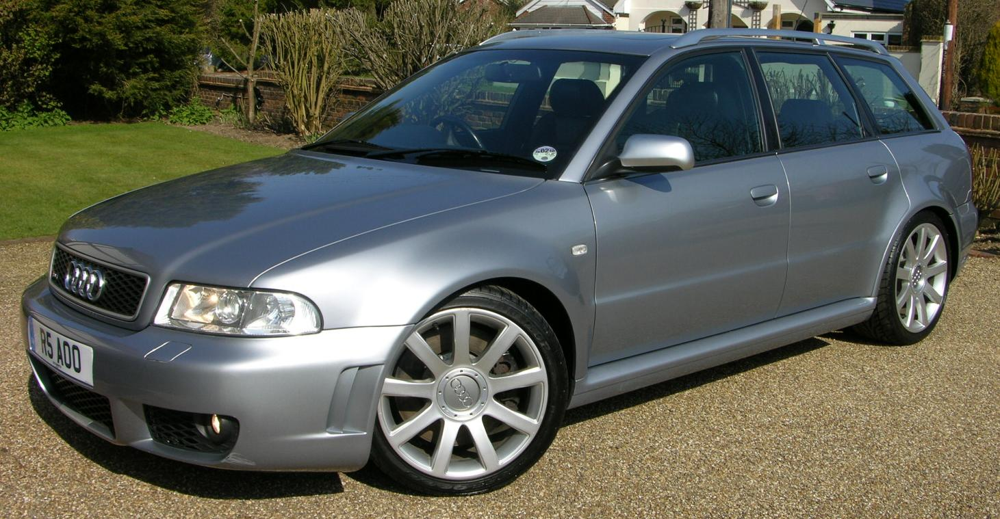 2001 Audi RS4 B5 Avant